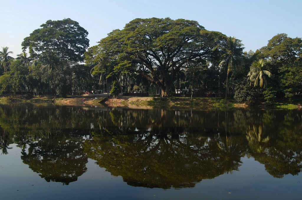 Romna park, Dhaka, Bangladesh.